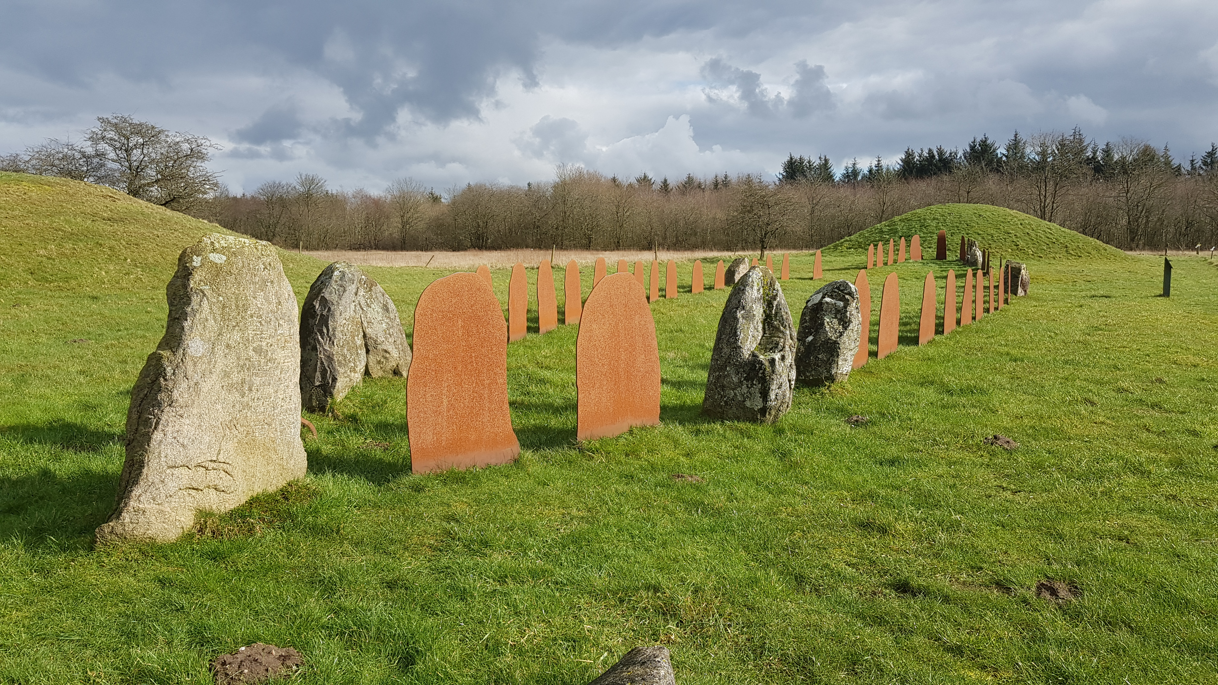 Skibssætningen på Klebæk Høje med runestenen yderst til venstre